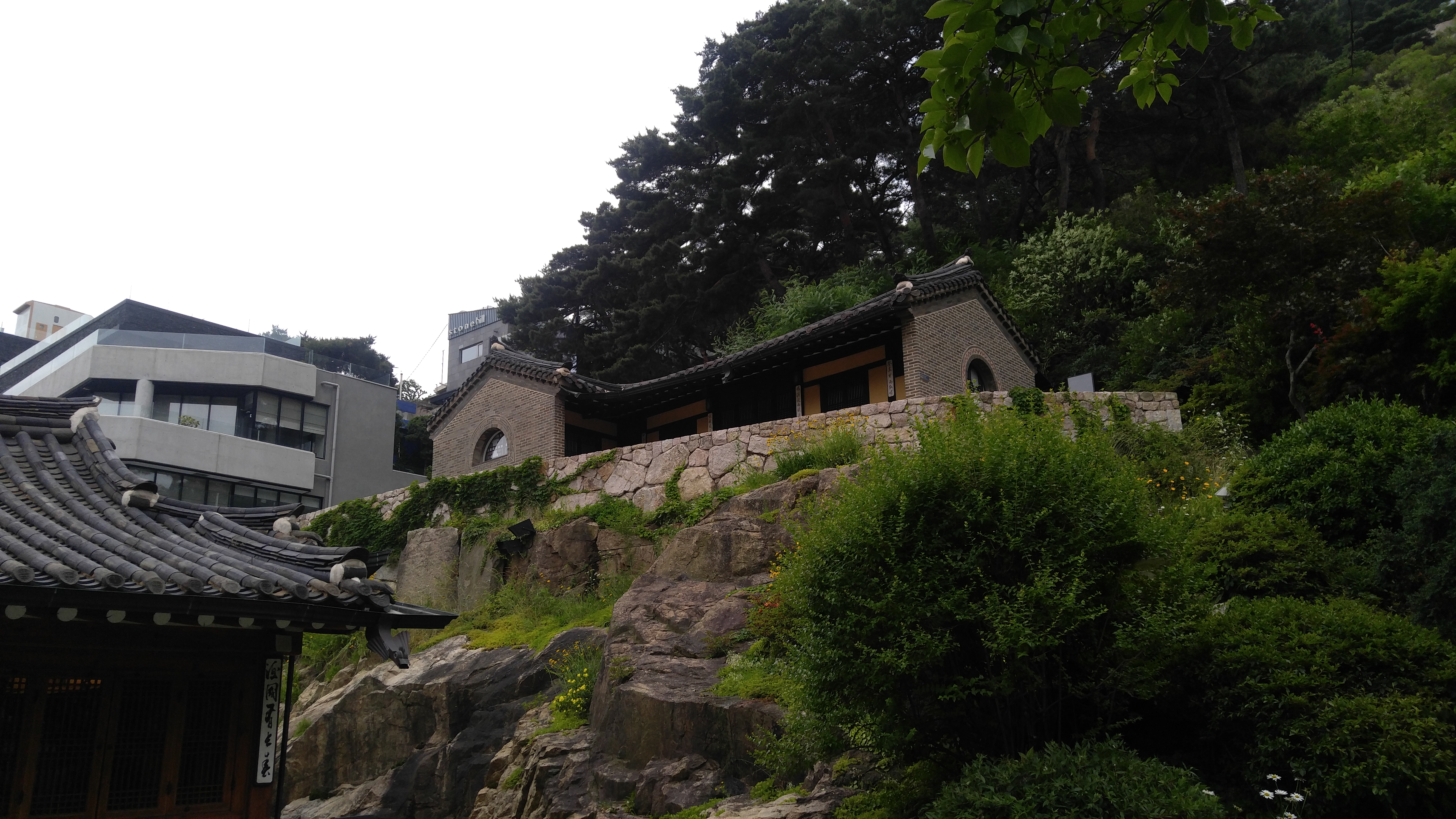 석파정 별당